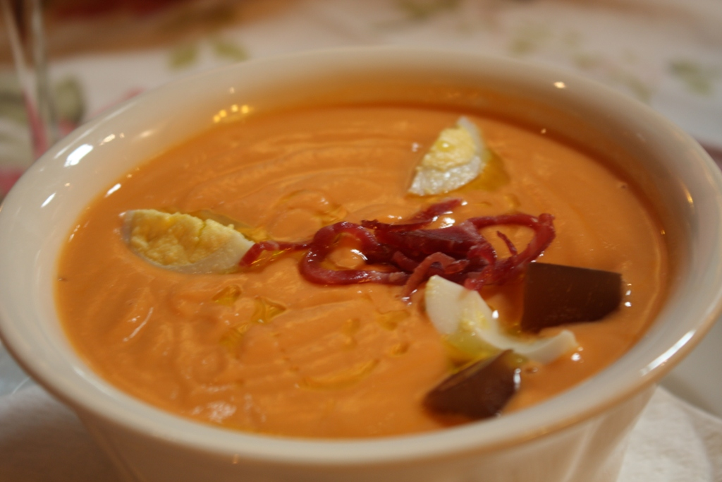 Salmorejo cordobés.